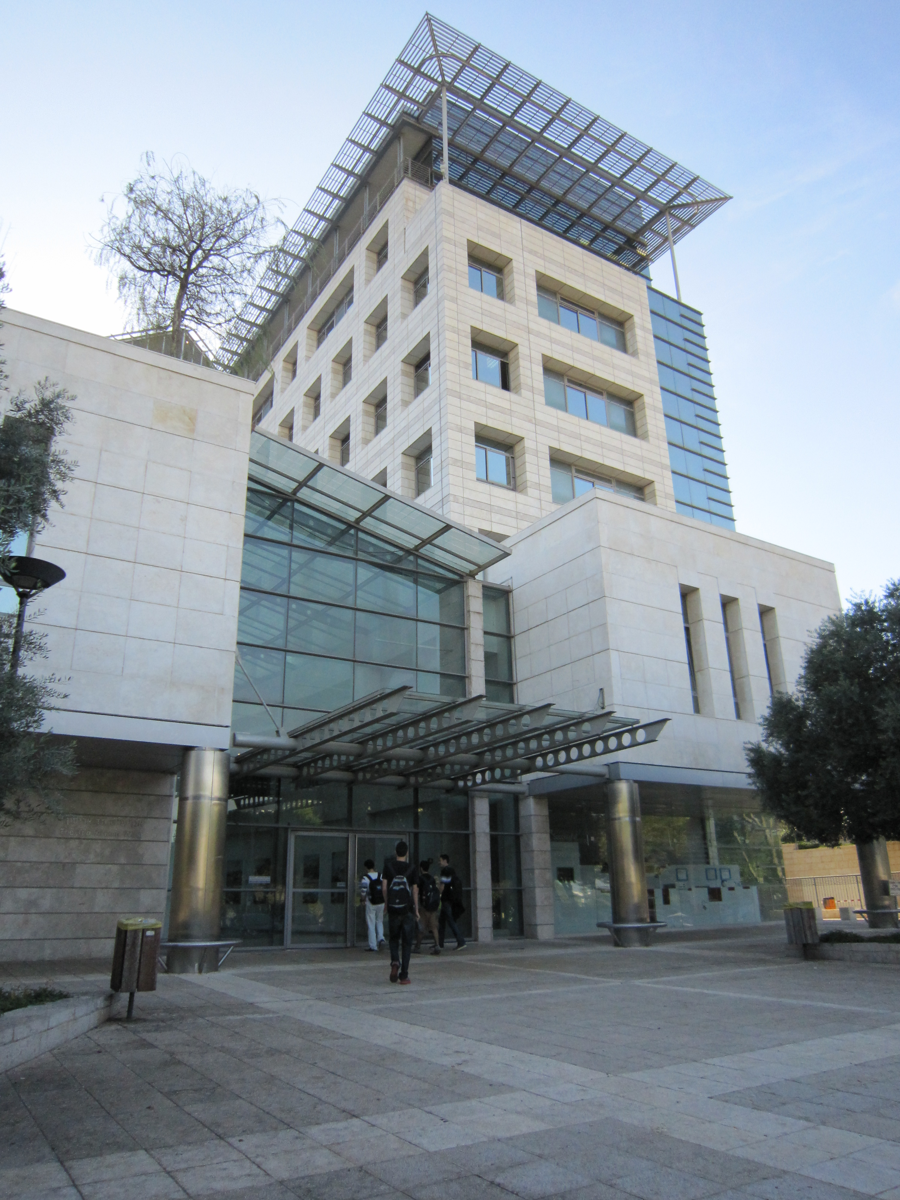 בנין הפקולטה למדעי המחשב בטכניון